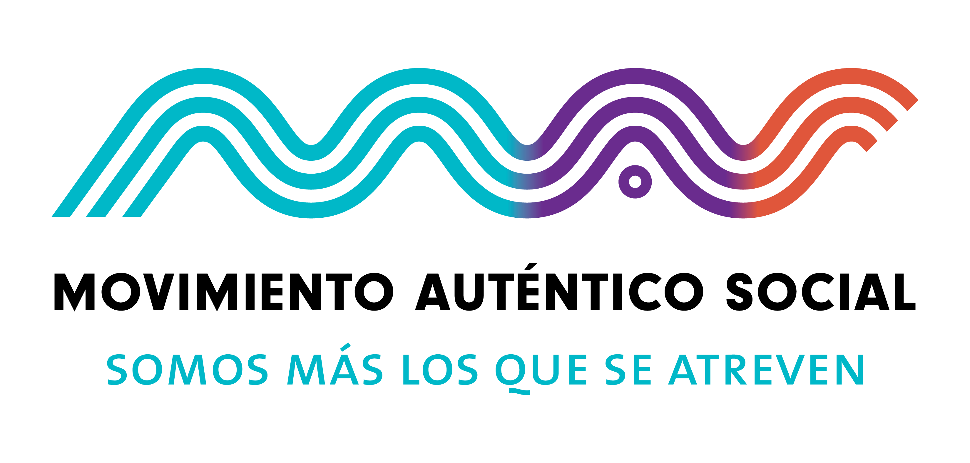 Logotipo Oficial del Movimiento Auténtico Social MAS